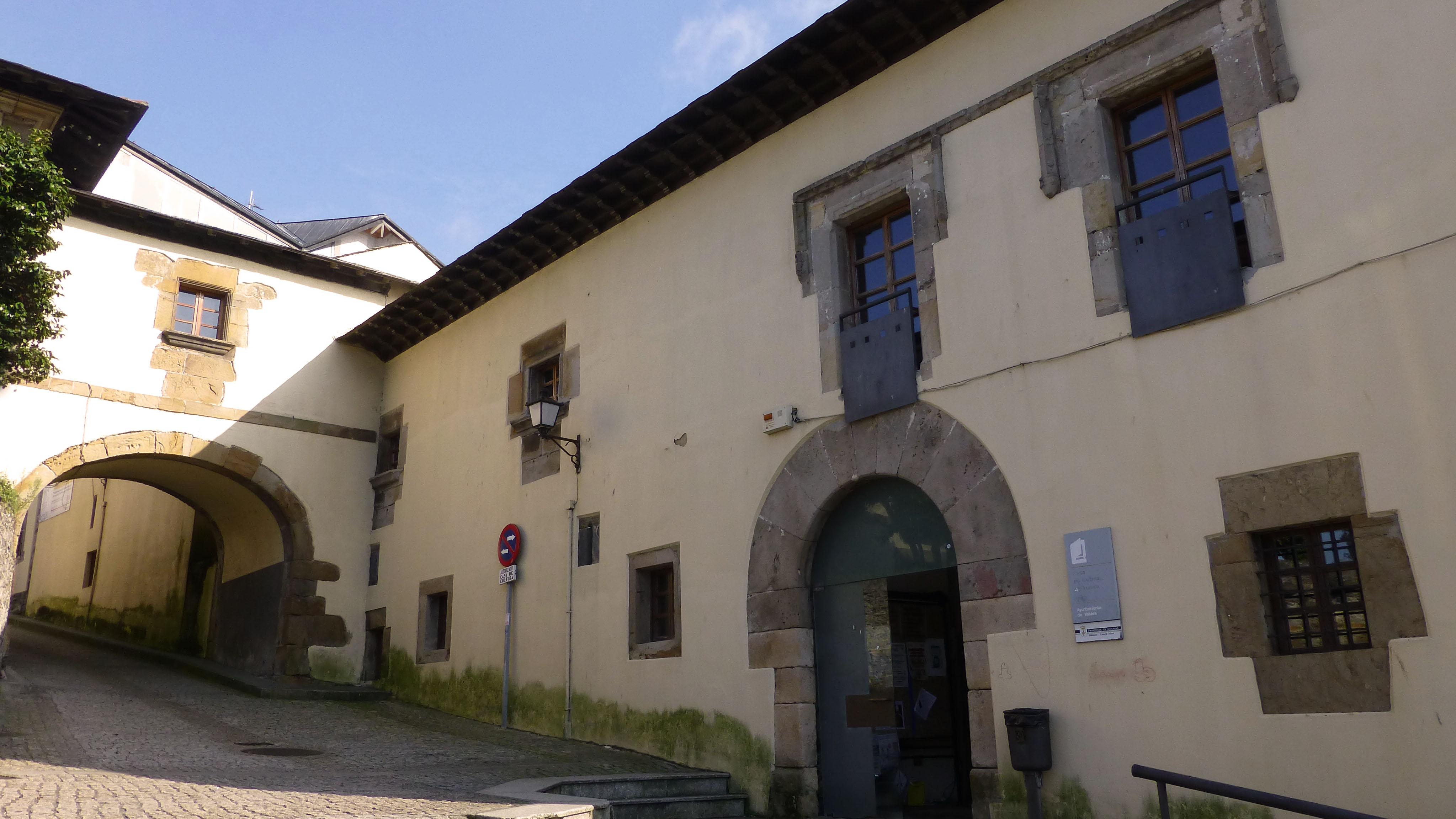 Palacio del Marqués de la Ferrera Palacio de la Moral